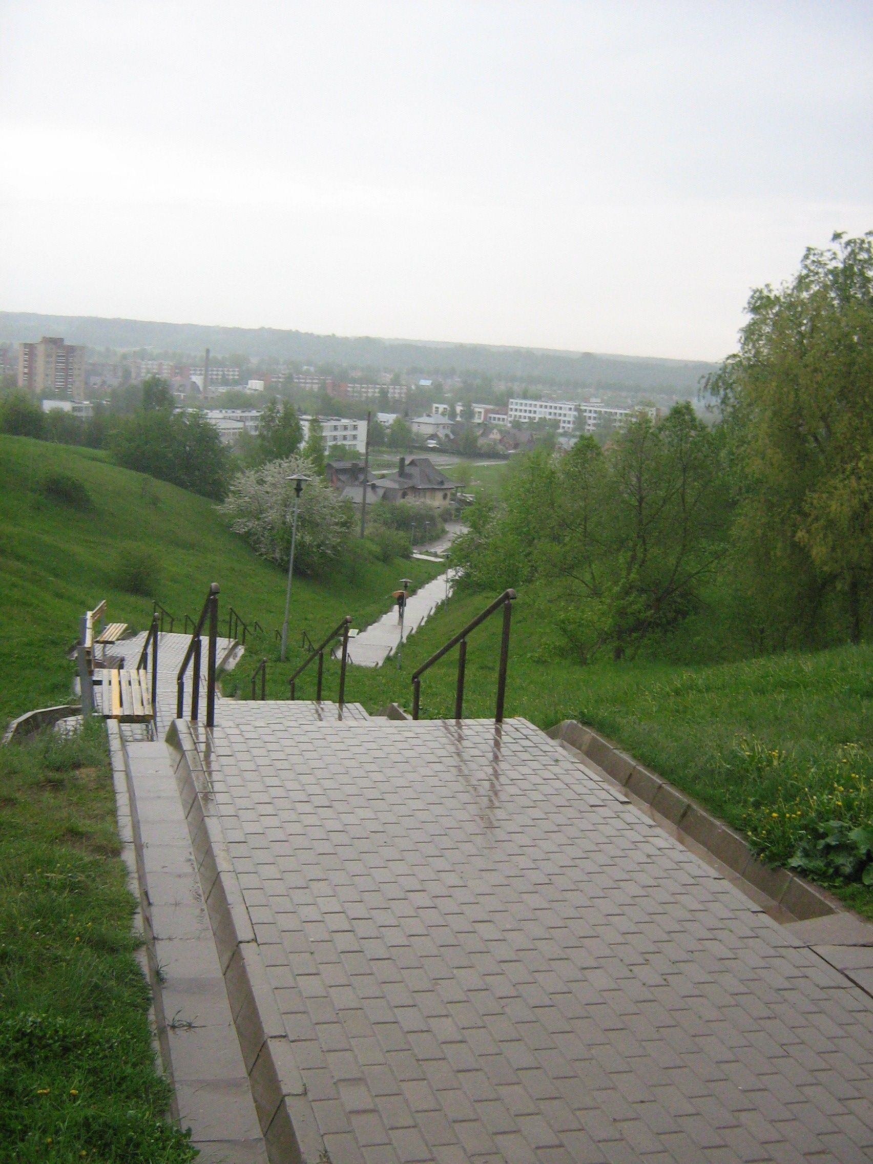 Naujieji Jonavos laiptai iš viršau